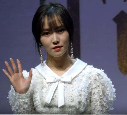 14일 오후 서울시 광진구 광장동 '예스24 라이브홀'에서 두번째 정규앨범 'Time for us(타임 포 어스)' 발매 쇼케이스가 열려 여자친구가 포토타임을 갖고 있다.